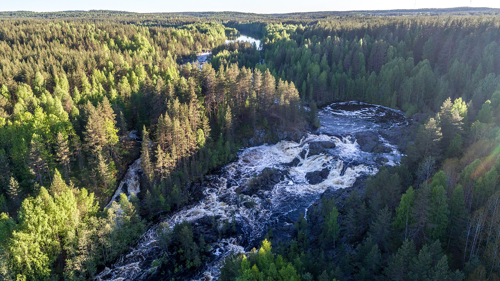 Гирвасский разрез каньона р. Суны: В каньоне р. Суна у плотины, расположенной в южной части п. Гирвас, Гирвас, Кондопожский район, Карелия This image is related to the protected area of Russia number 1010025